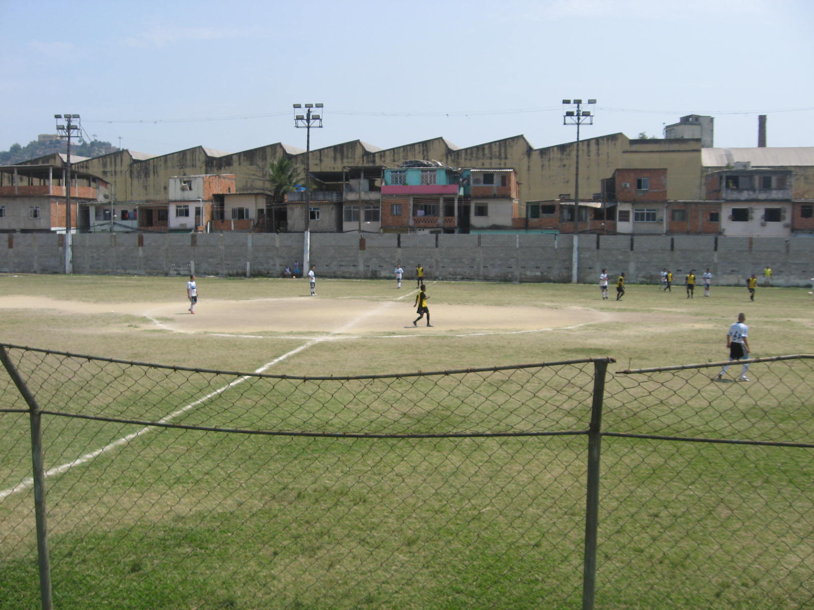 Estádio Ademar Bebiano, localizado em Inhaúma, do Everest AC.